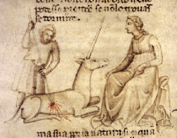 La Mise à mort de la licorne. Bestiaire (italien 450), folio 13 verso, XIVème siècle, miniature, Bibliothèque Nationale de France, Paris.